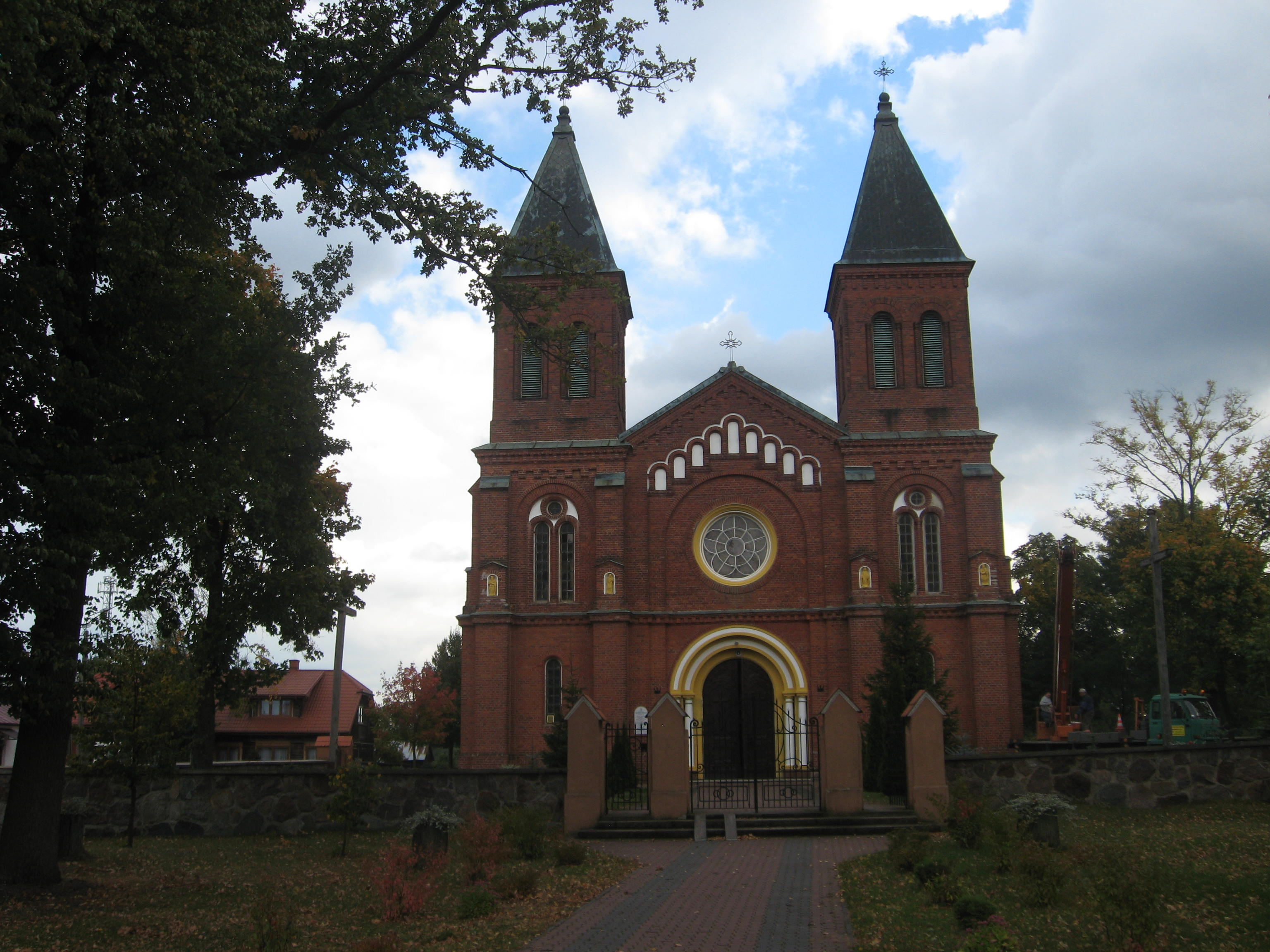 kościół par. p.w. św. Stanisława Biskupa, 1895-1897 Stoczek, Gmina Stoczek